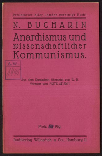 Nikolai Bucharin: Anarchismus und wissenschaftlicher Kommunismus Hamburg, Willaschek, (1919), 15 Seiten.